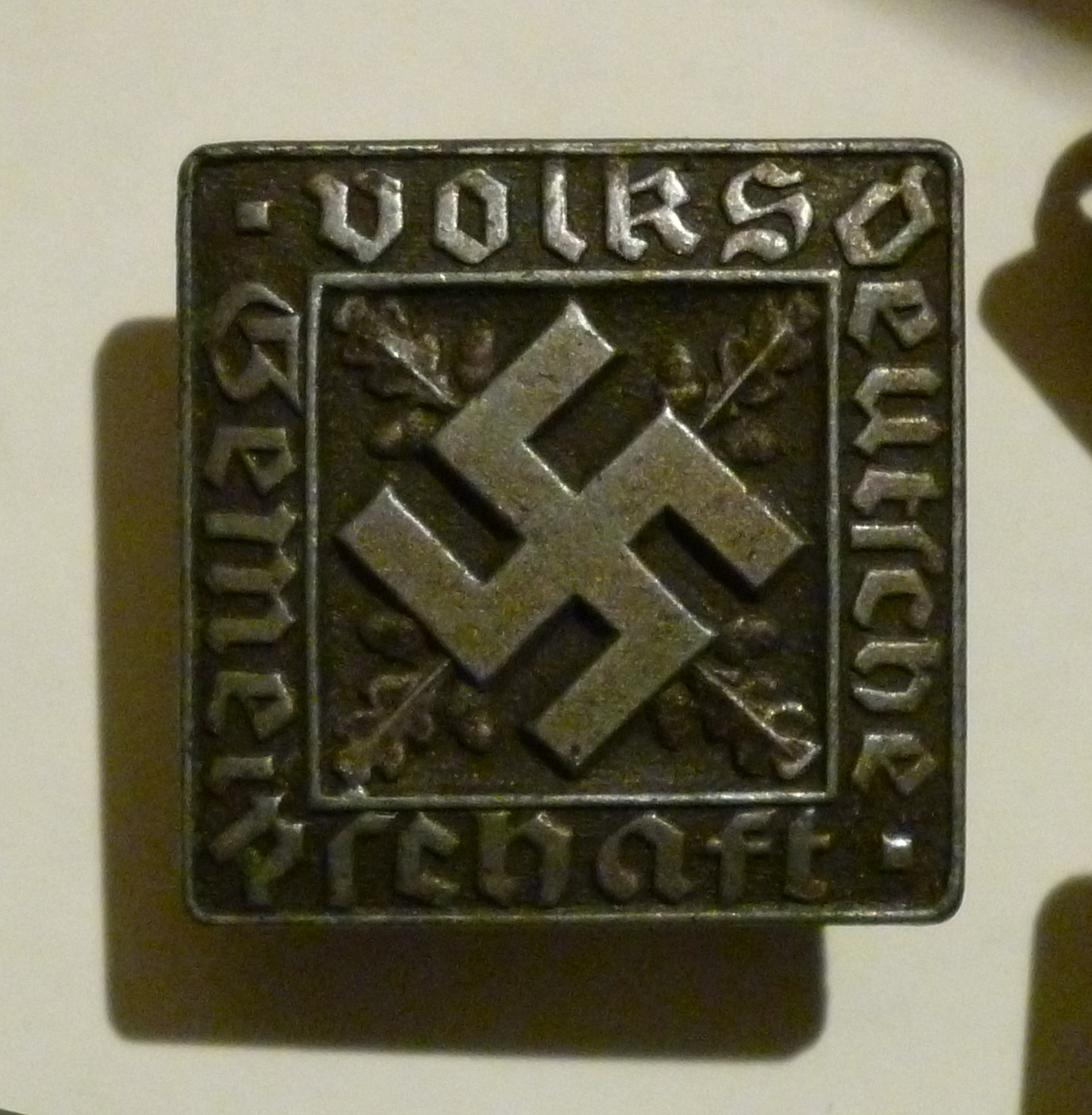 Odznaka noszona przez Volksdeutschów, Niemców mieszkających poza granicami Niemiec którzy zadeklarowali pochodzenie niemieckie.